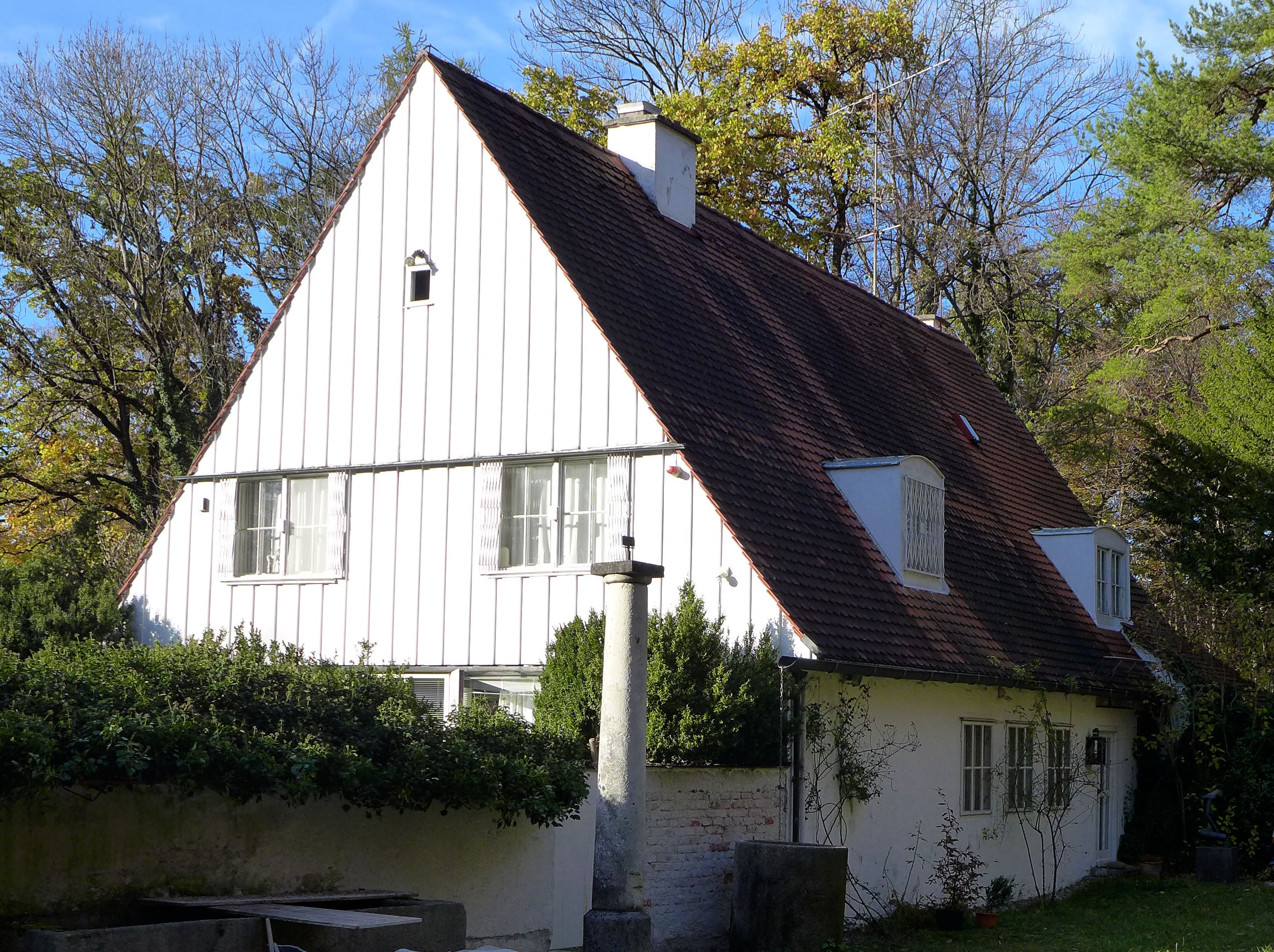 Im Eichgehölz 15, München